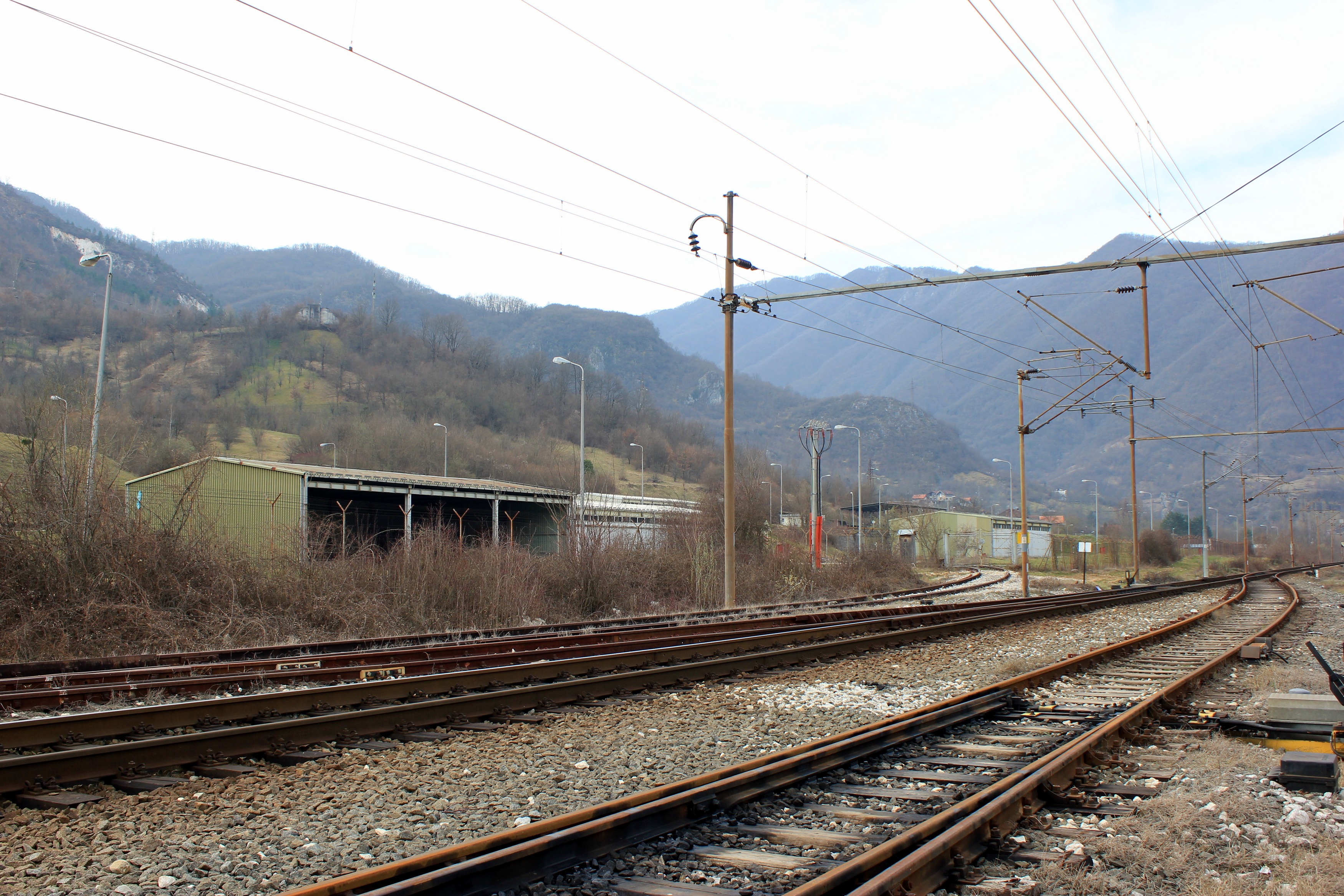 Hallen des ehemaligen Lagers Čelebići in der Gemeinde Konjic, Bosnien und Herzegowina.